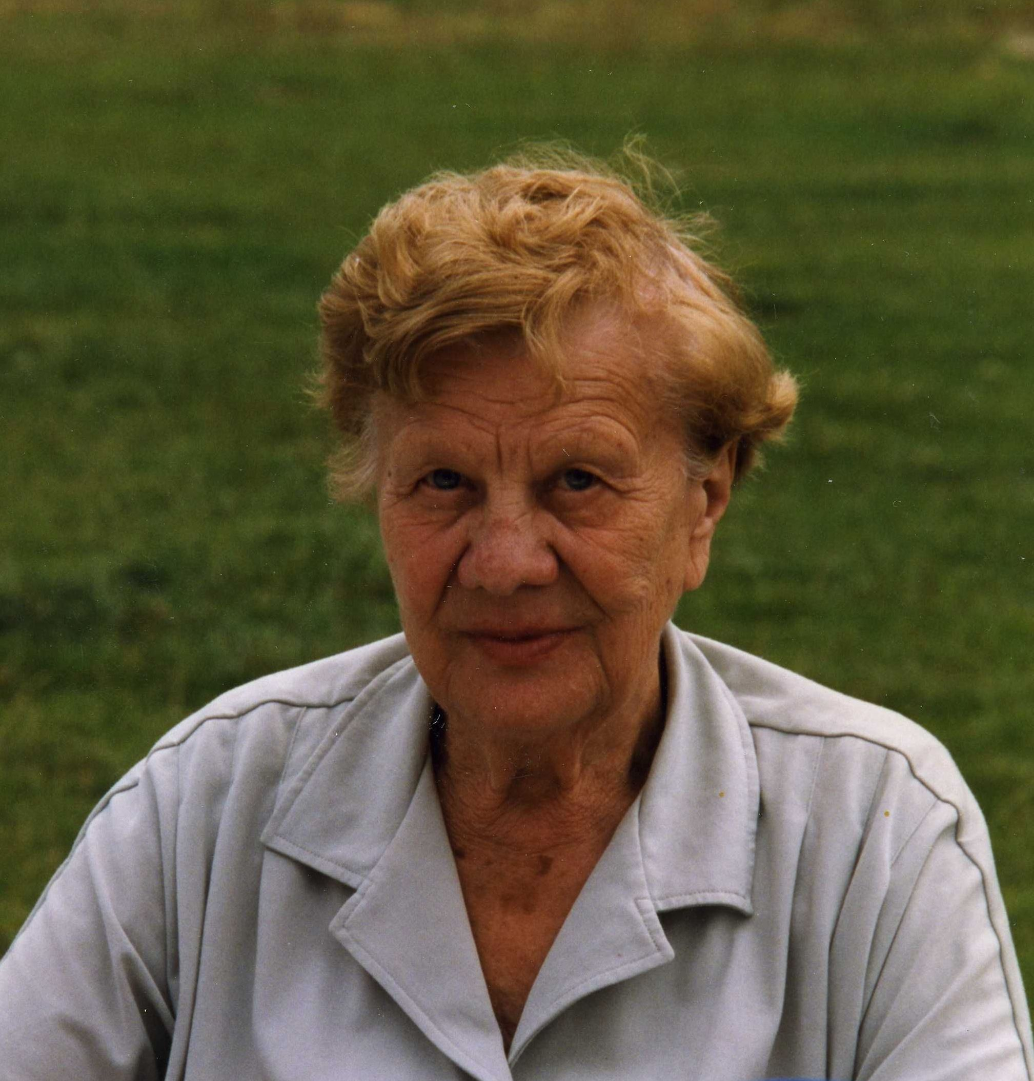 Bottyán Olga (fotó: Heigl Tímea)